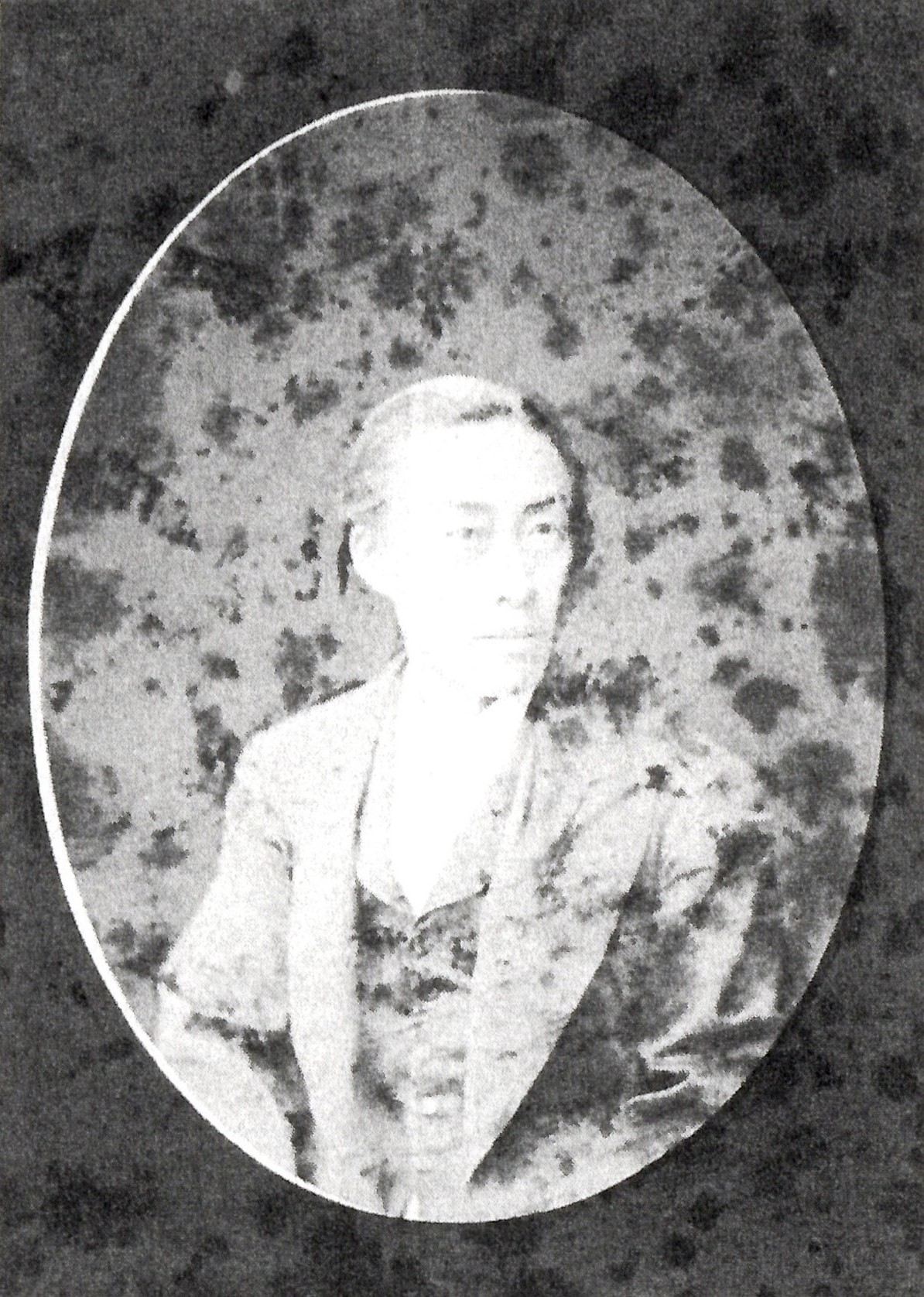 堤功長の肖像写真。